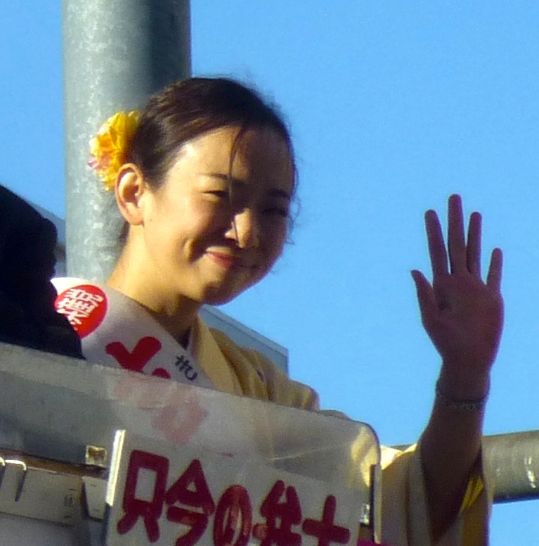 吉良 佳子（きら よしこ、Yoshiko Kira、1982年9月14日 - ）は、日本の政治家、参議院議員。日本共産党准中央委員。